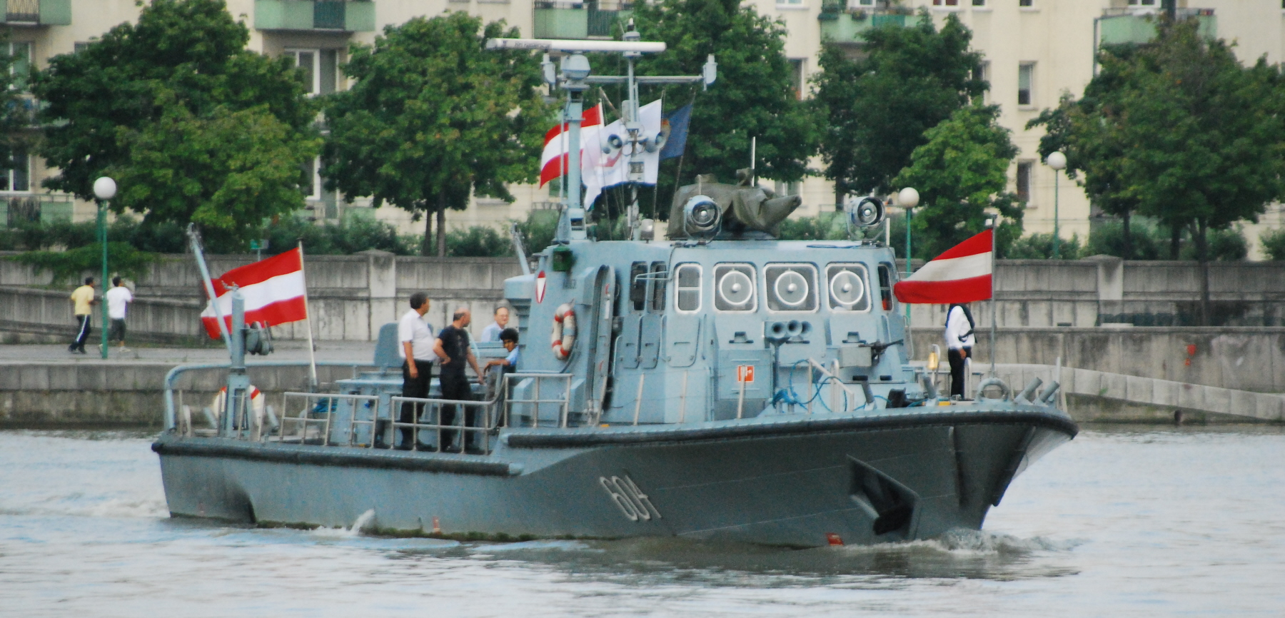 Die Niederösterreich auf der Fahrt vom Liegeplatz unter der Reichsbrücke zur Lissa-Feier.